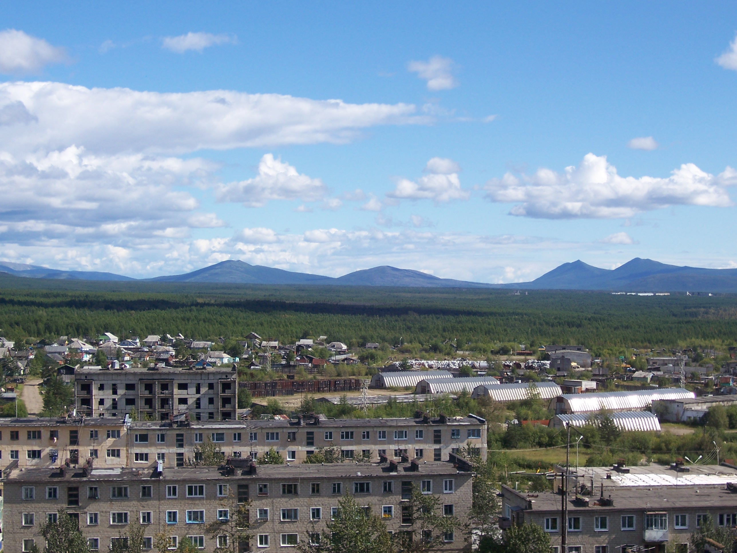 Посёлок Сокол Магаданской области